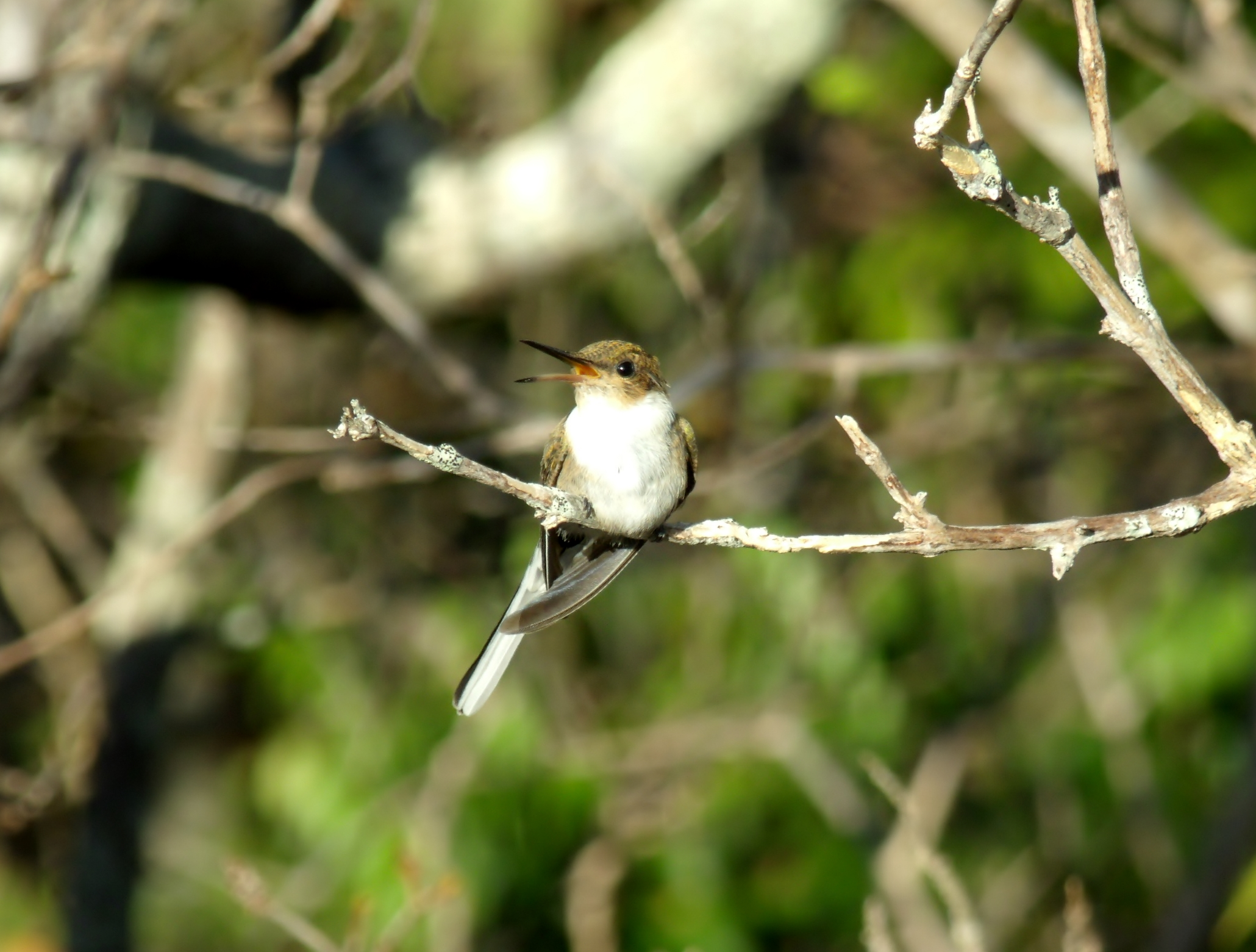 Filhote de Heliactin bilofus abrindo o bico pedindo comida para a mãe.